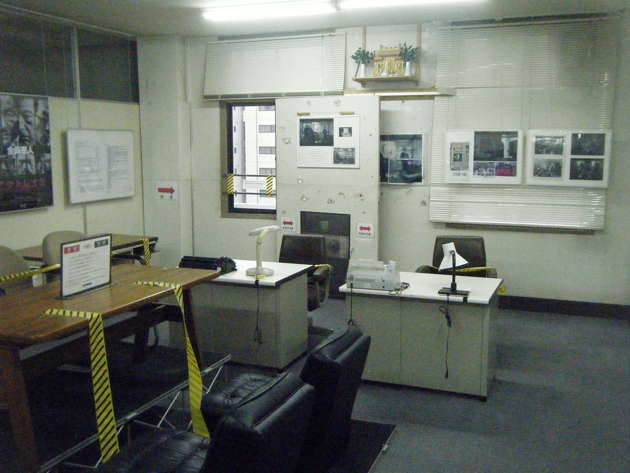 映画「アウトレイジ」で大友組事務所として撮影に使用された高砂ビル402号室。撮影終了後も一般公開されている。兵庫県神戸市中央区